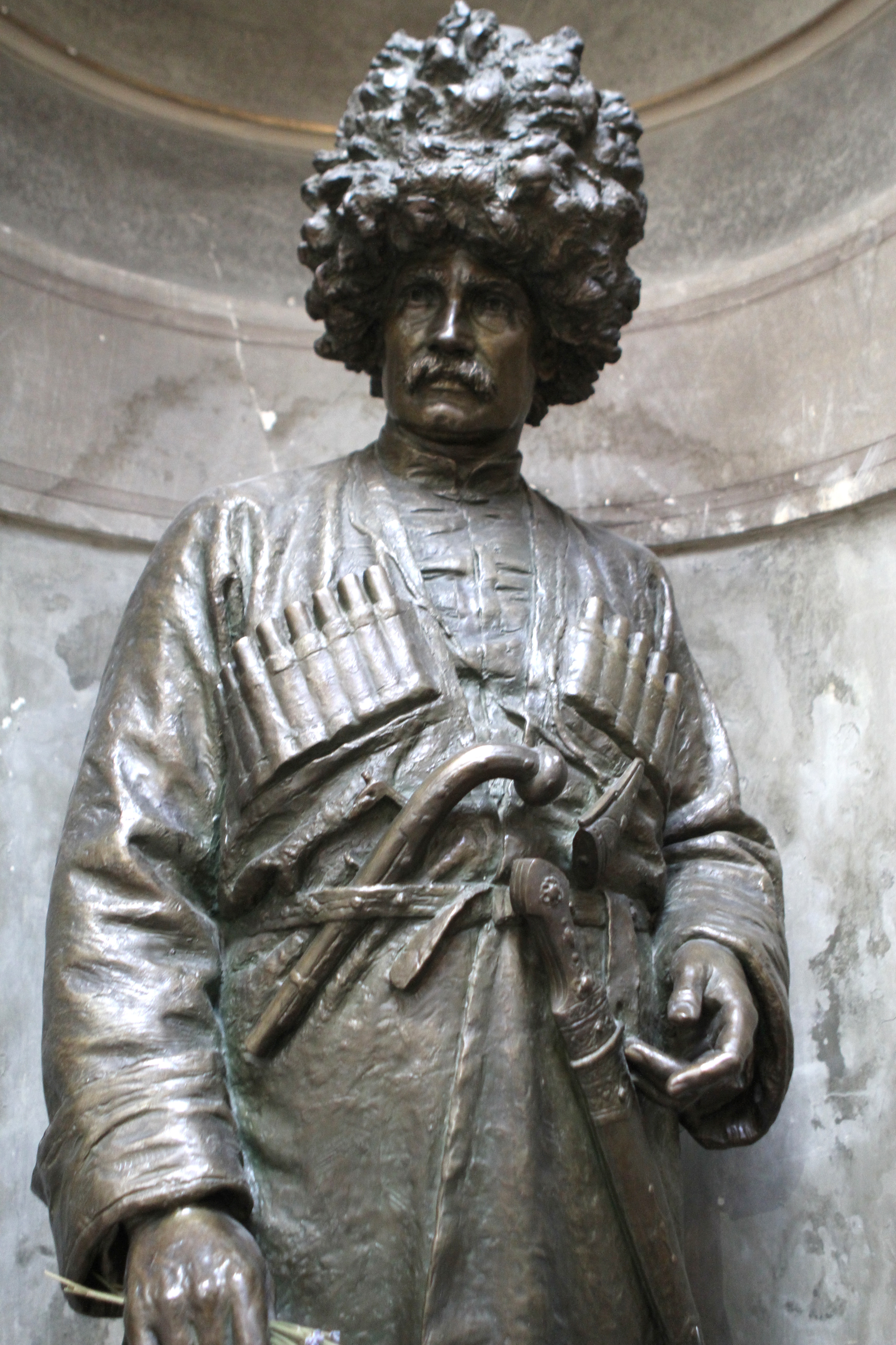 Fabriksgebäude, Ehem. Zacherlsche Insektenpulver-Fabrik